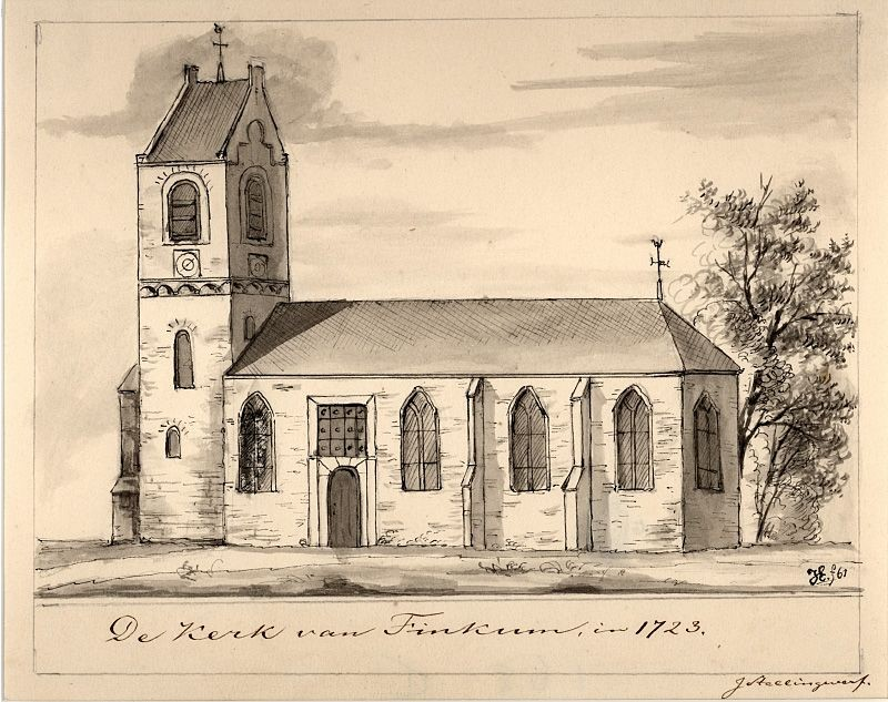 De tsjerke fan Feinsum yn 1723